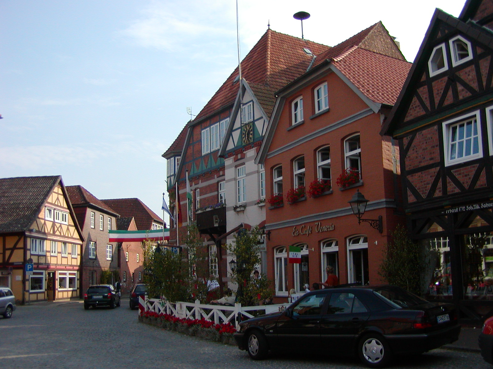 Markt in Hitzacker